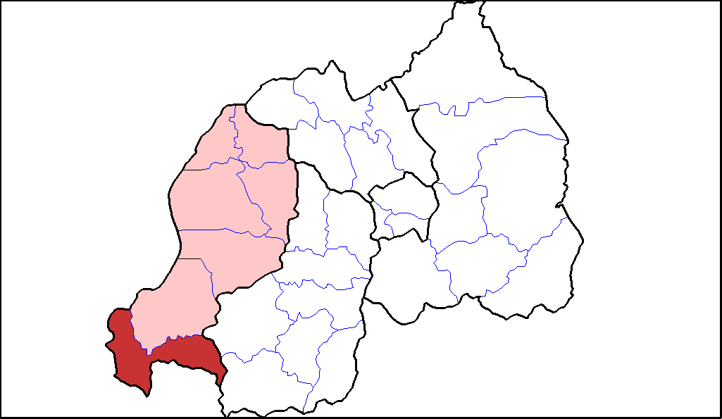 Distretto di Rusizi.